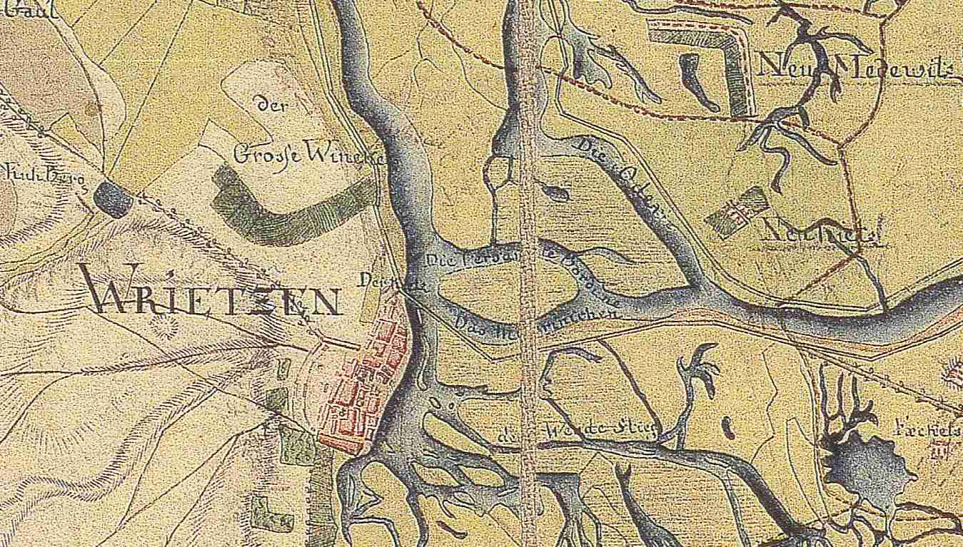 Wriezen, Lkr. Märkisch-Oderland, Brandenburg, Deutschland, Ausschnitt aus dem Schmettauschen Kartenwerk von 1767-87